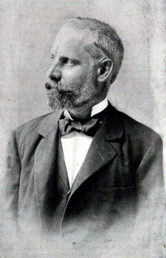 Plósz Sándor (1846–1925) jogász, egyetemi tanár, politikus, miniszter, a Magyar Tudományos Akadémia rendes, majd tiszteleti tagja. Ellinger Ede fényképfelvétele